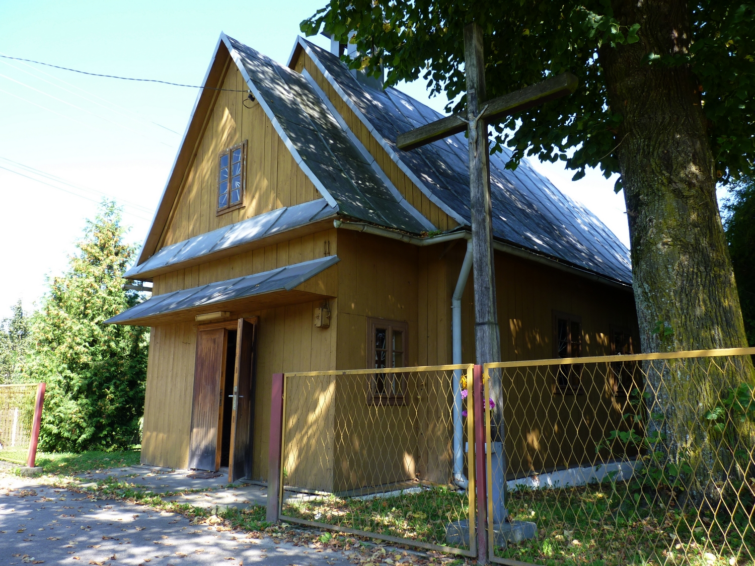 Drewniany kościół pw. Matki Bożej Anielskiej z 1872 r.